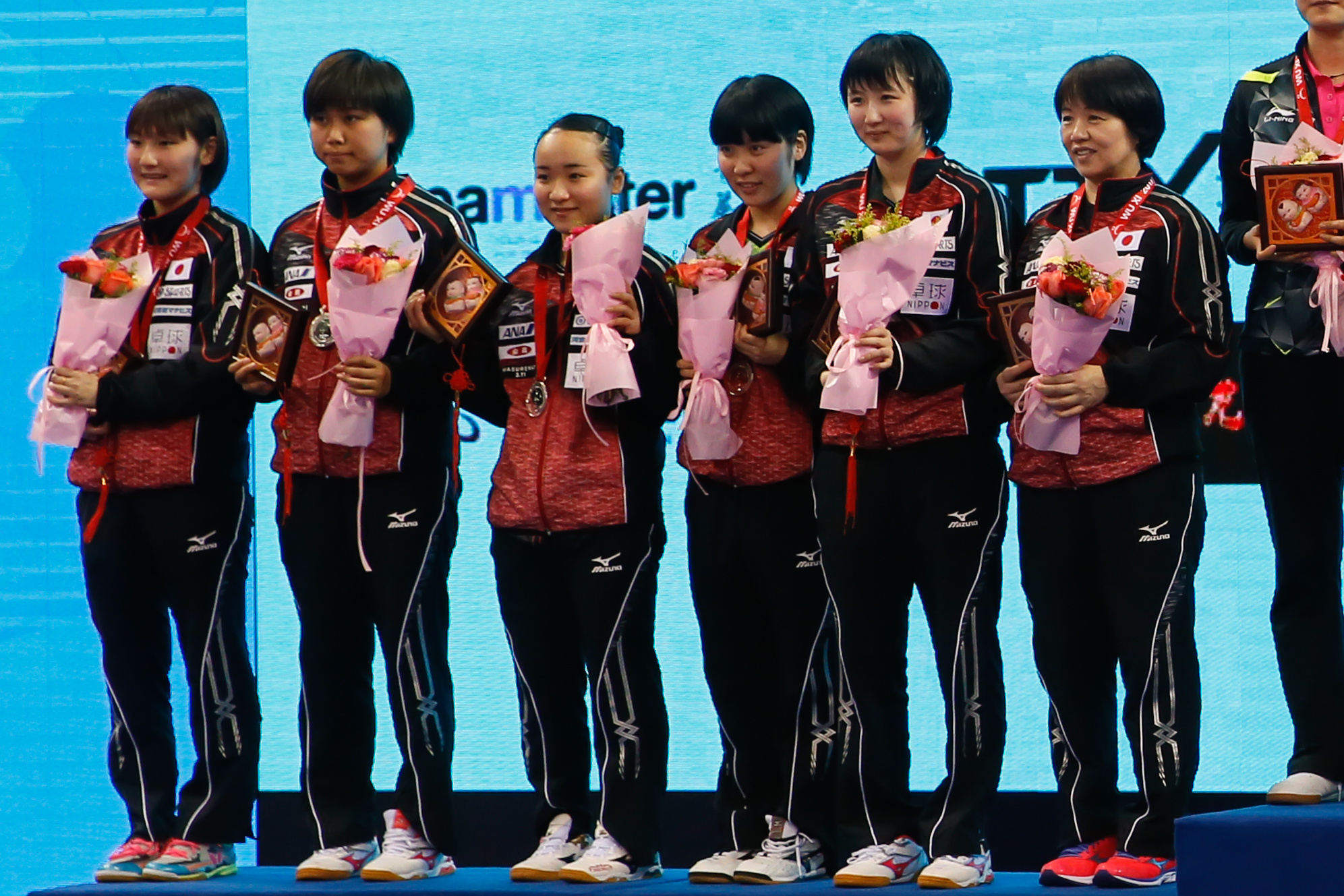 _K0K5017